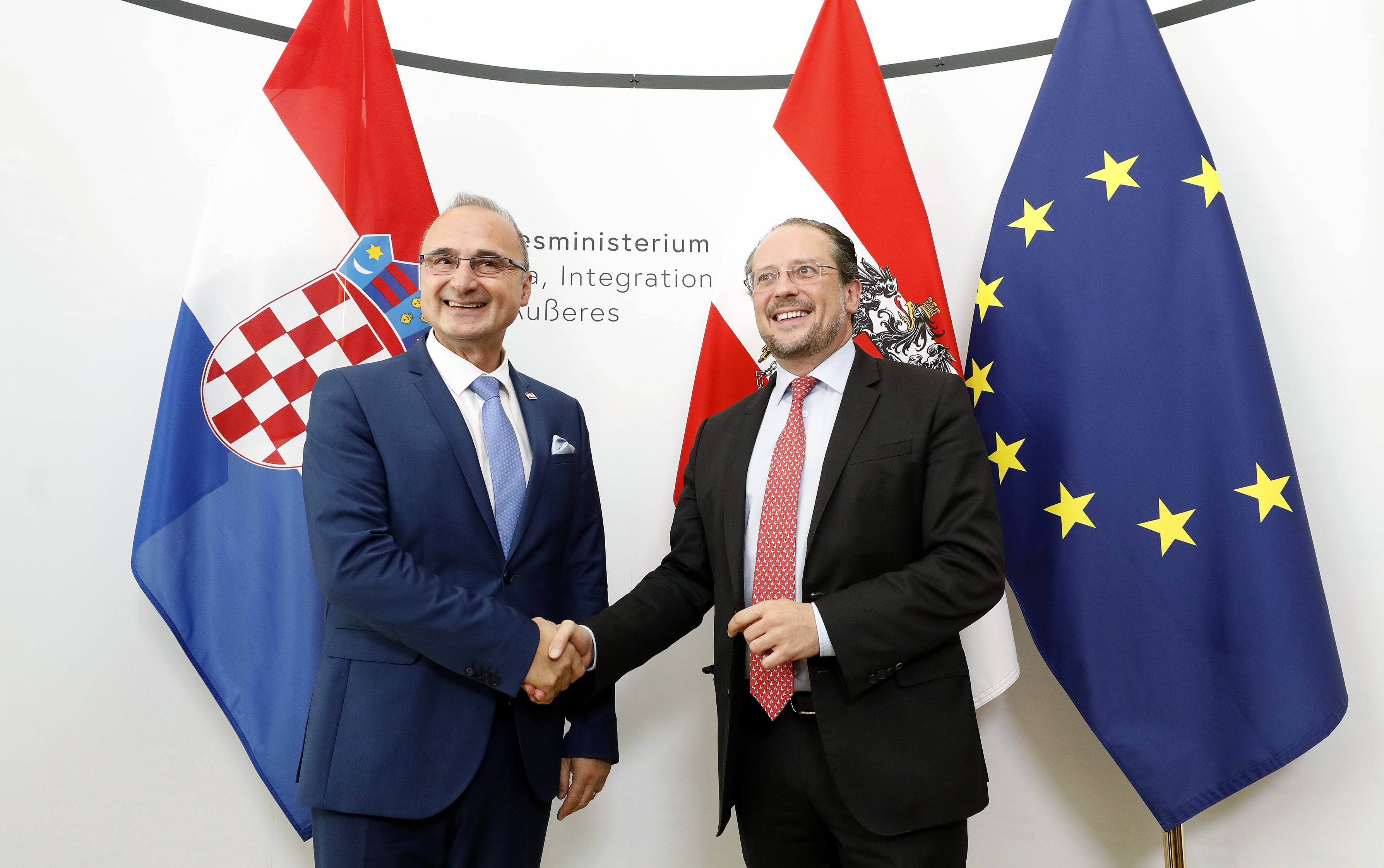 Bundesminister Alexander Schallenberg trifft den kroatischen Außenminister Gordan Grlic Radman, Wien. 13.09.2019, Foto: Dragan Tatic